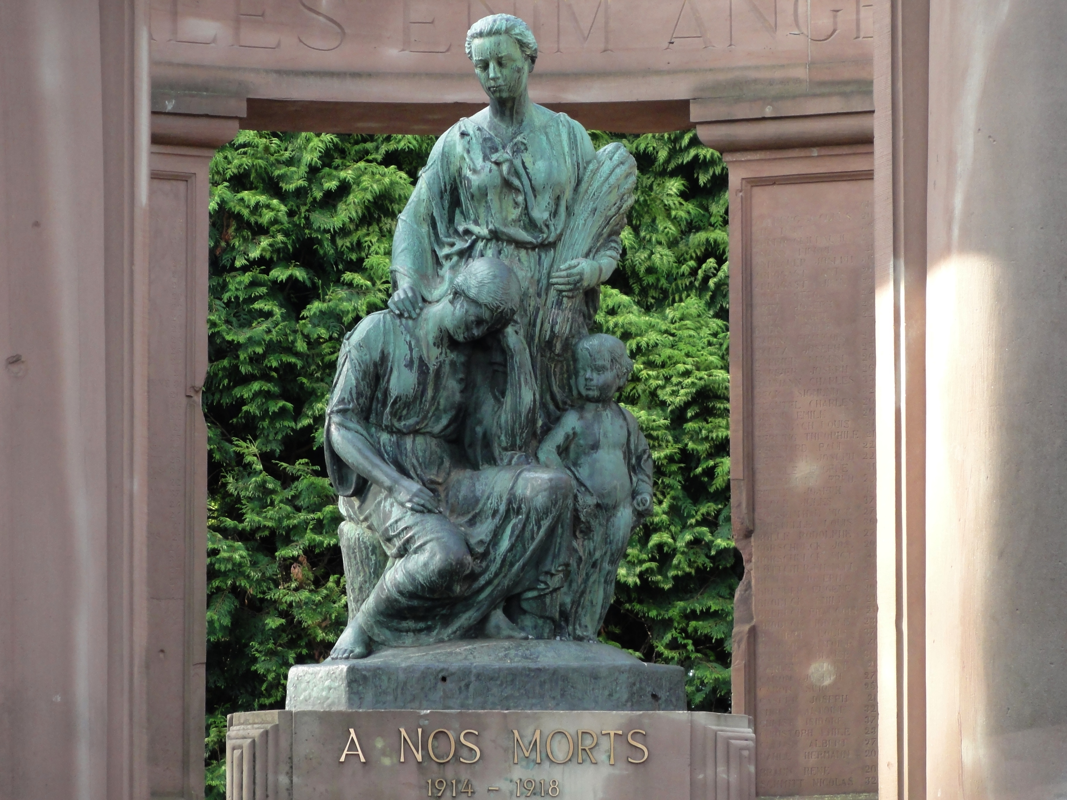 Alsace, Bas-Rhin, Haguenau, Monument aux morts (1925), boulevard Nessel. .